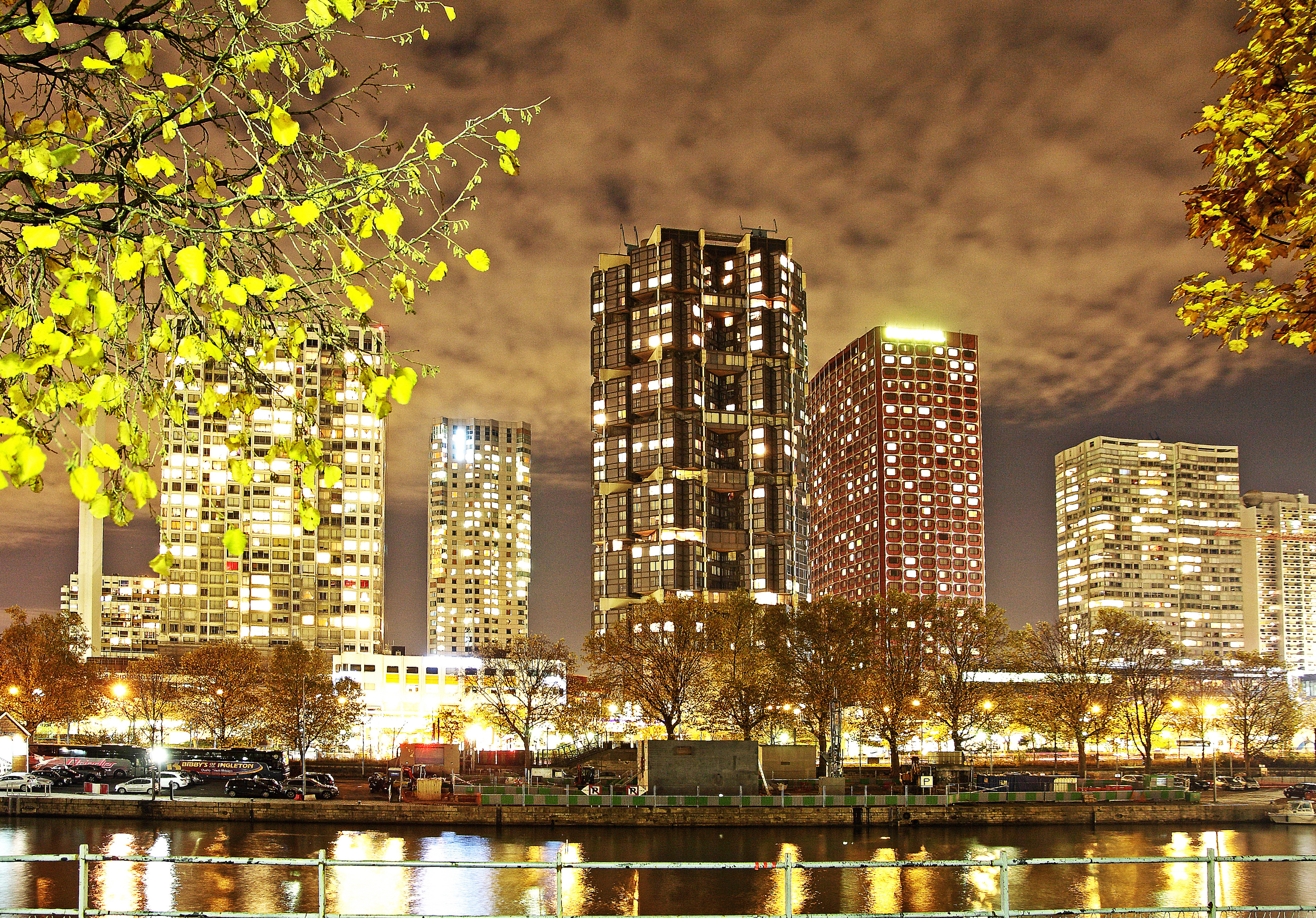 Front de Seine aux feuilles vertes